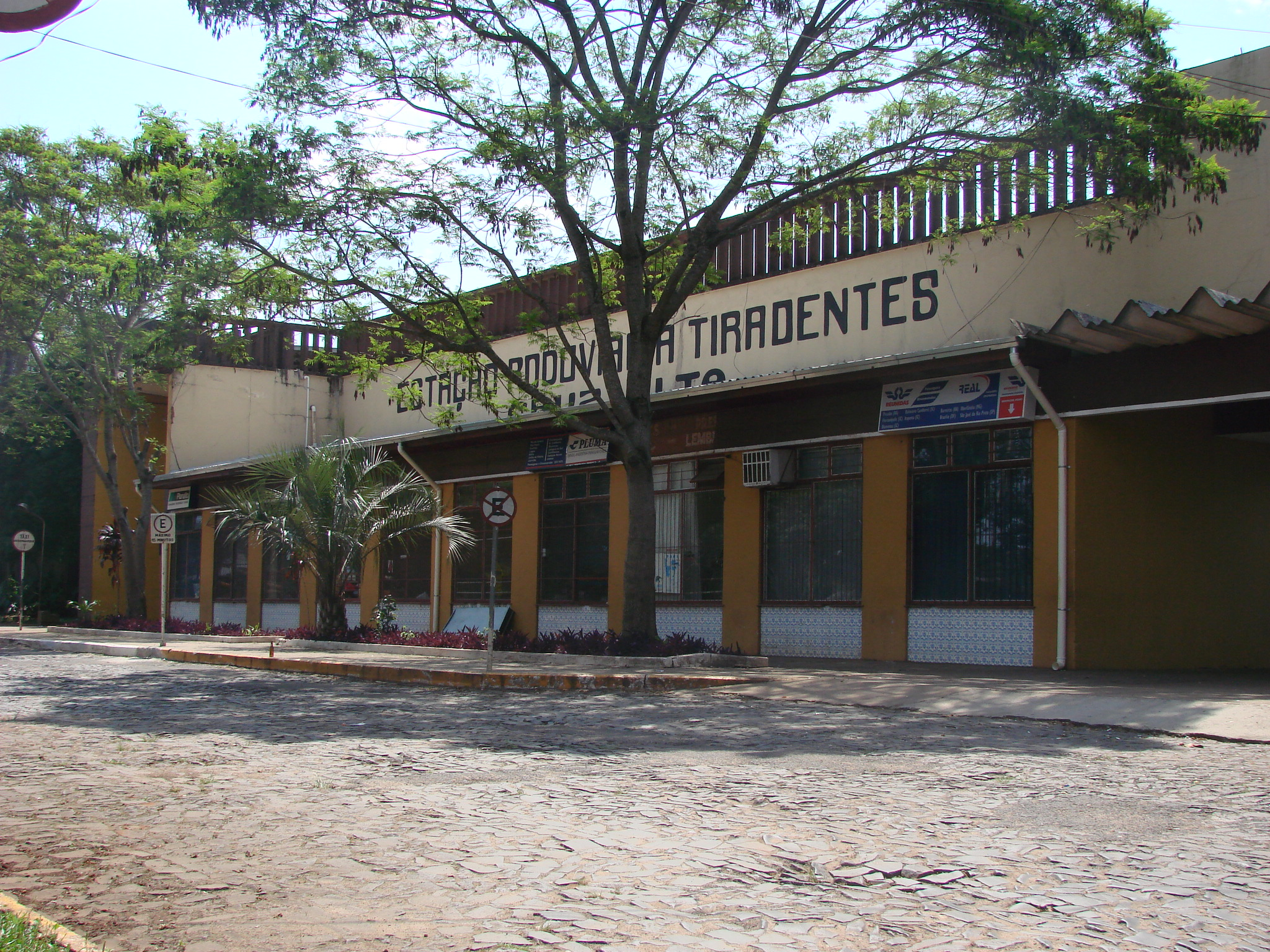 Estação Rodoviária Tiradentes, em Cruz Alta, na Avenida Plácido de Castro.